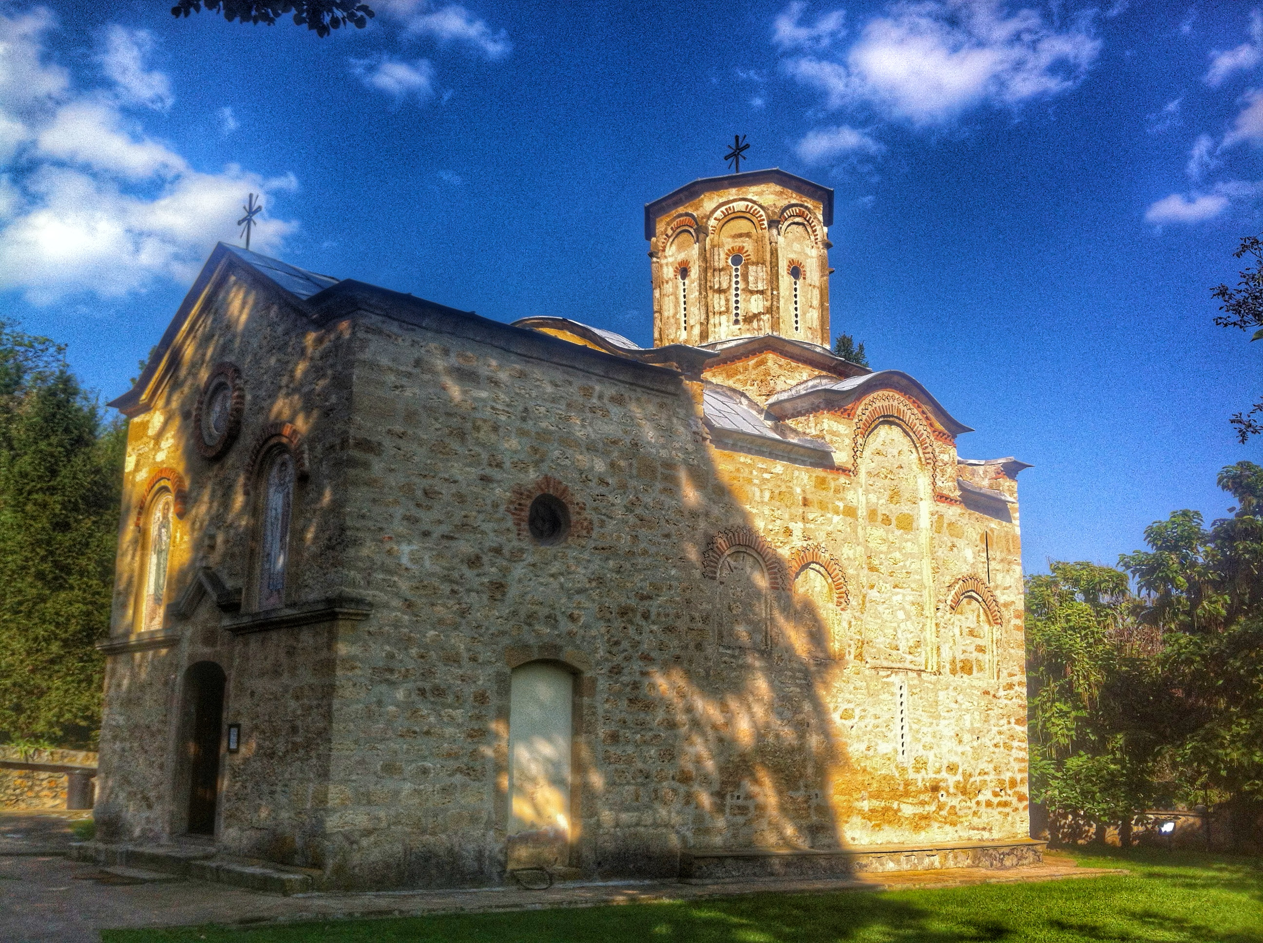 Манастир Копорин је саграђен у XV veku i nalazi se oko 7 km od Velike Plane.